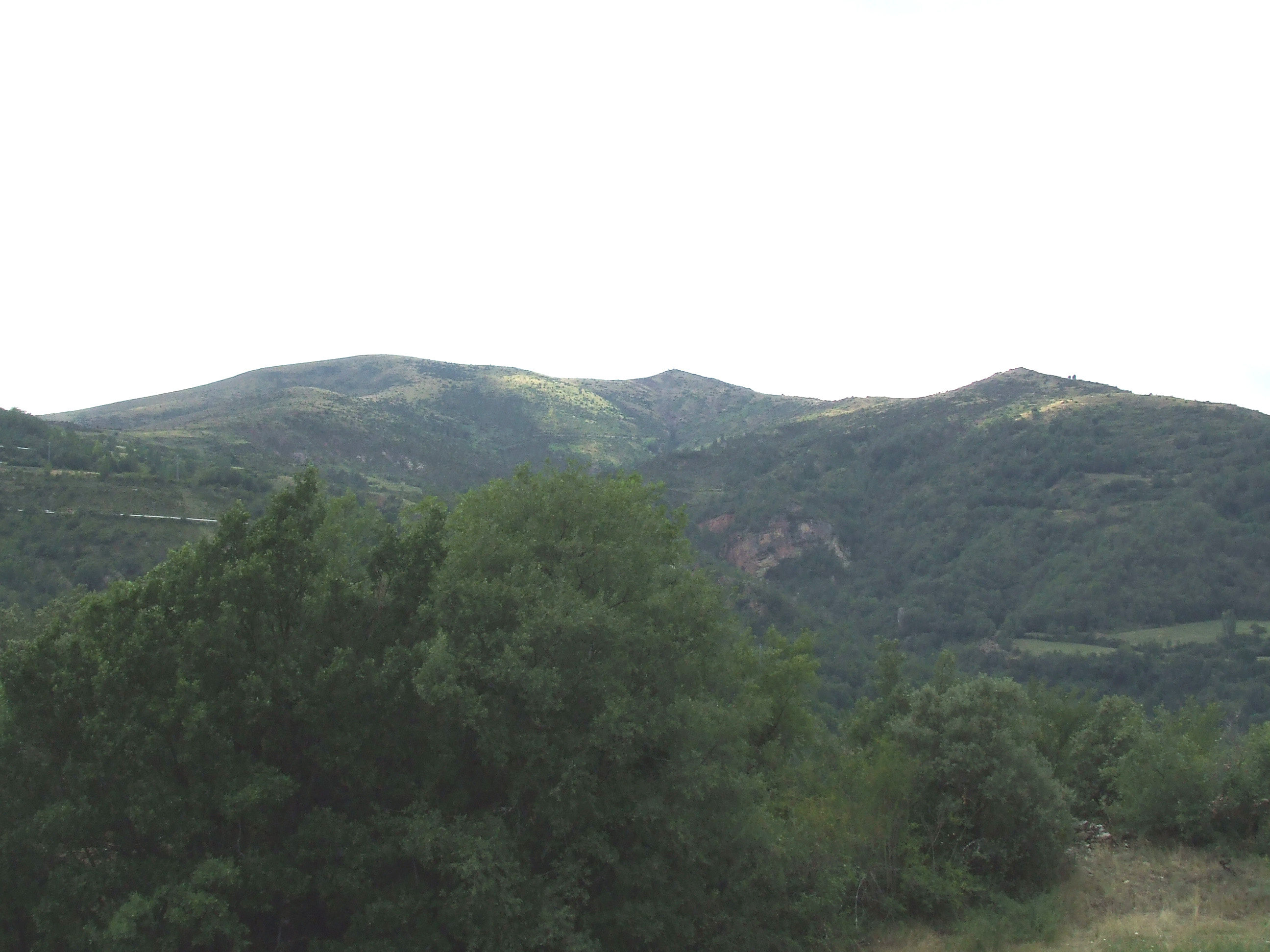 El Tossal de la Creu, la Serra de Santa Bàrbara i el Serrat de l'Aire (Senterada i la Torre de Cabdella, Pallars Jussà)